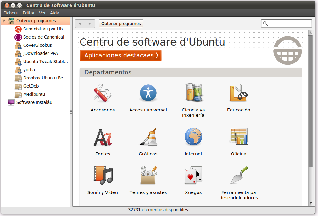 Centru de Software d'Ubuntu